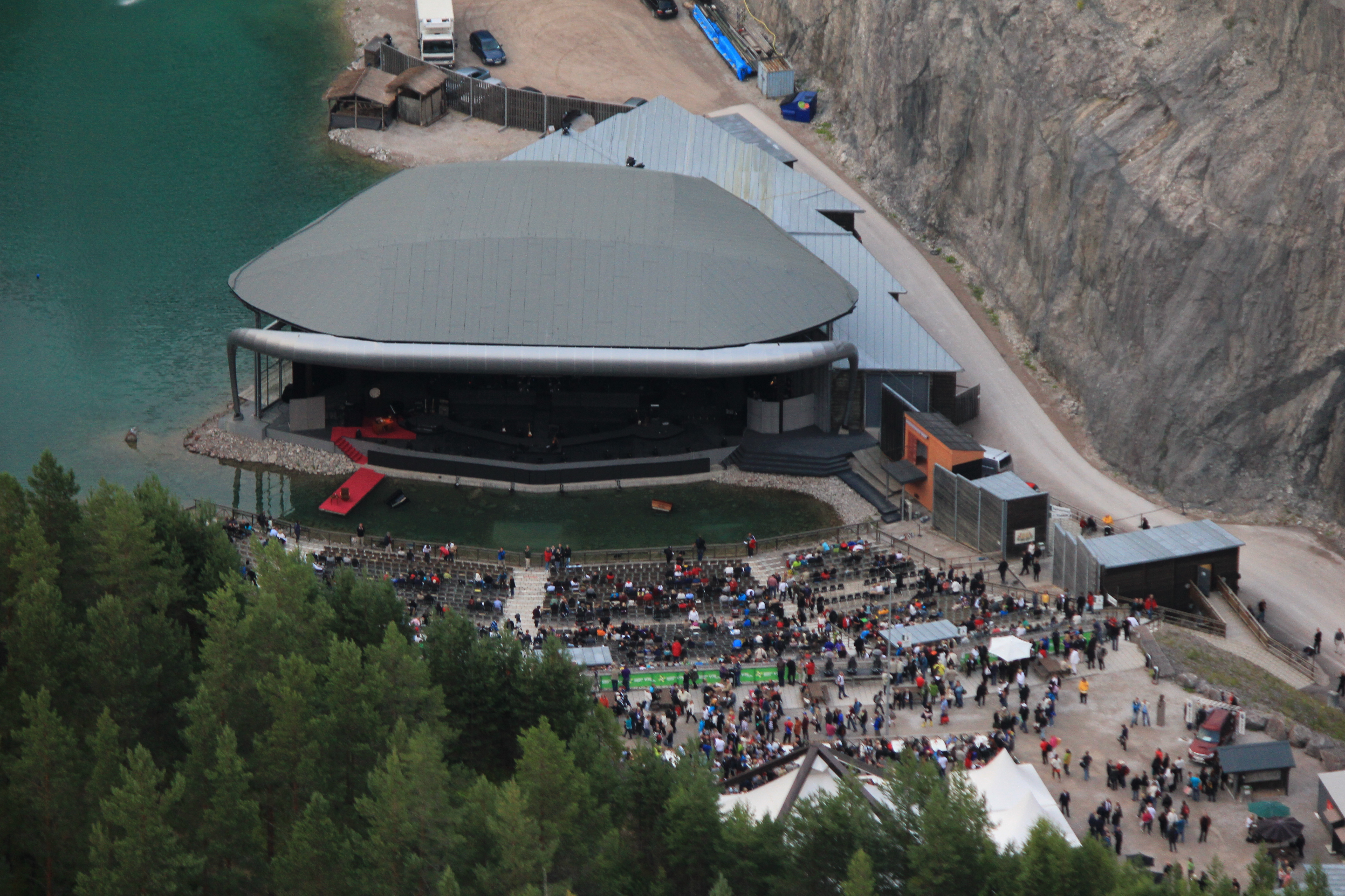 Flygfoto över Dalhalla, Rättviks kommun, Dalarnas län, Sverige This aerial photograph has been approved for publishing by the Swedish Armed Forces with the ID: FMTM 10 830:11043 This tag does not indicate the copyright status of the attached work. A normal copyright tag is still required. See Commons:Licensing for more information. English | svenska | +/−